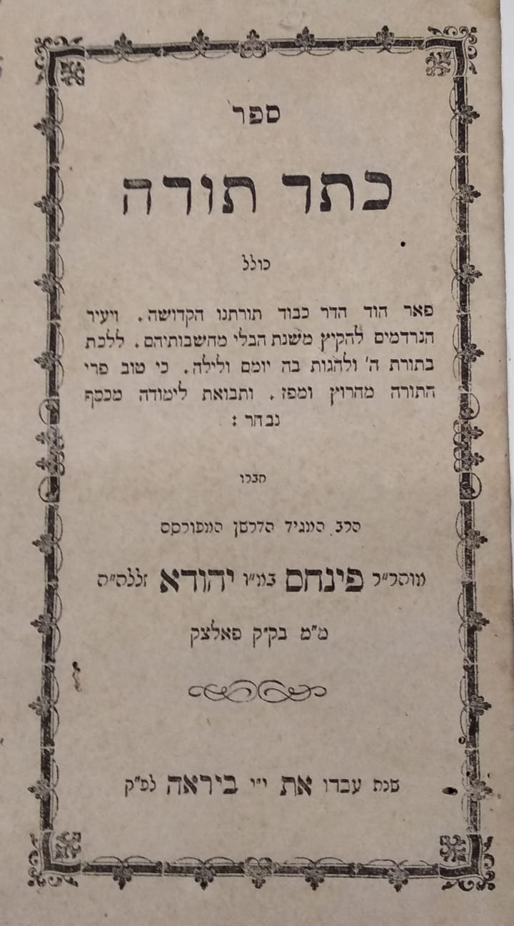 שער הספר 'כתר תורה', קניגסברג ה'תרי"ט, מספריית הרב יששכר תמר, ישיבת הר עציון, אלון שבות.